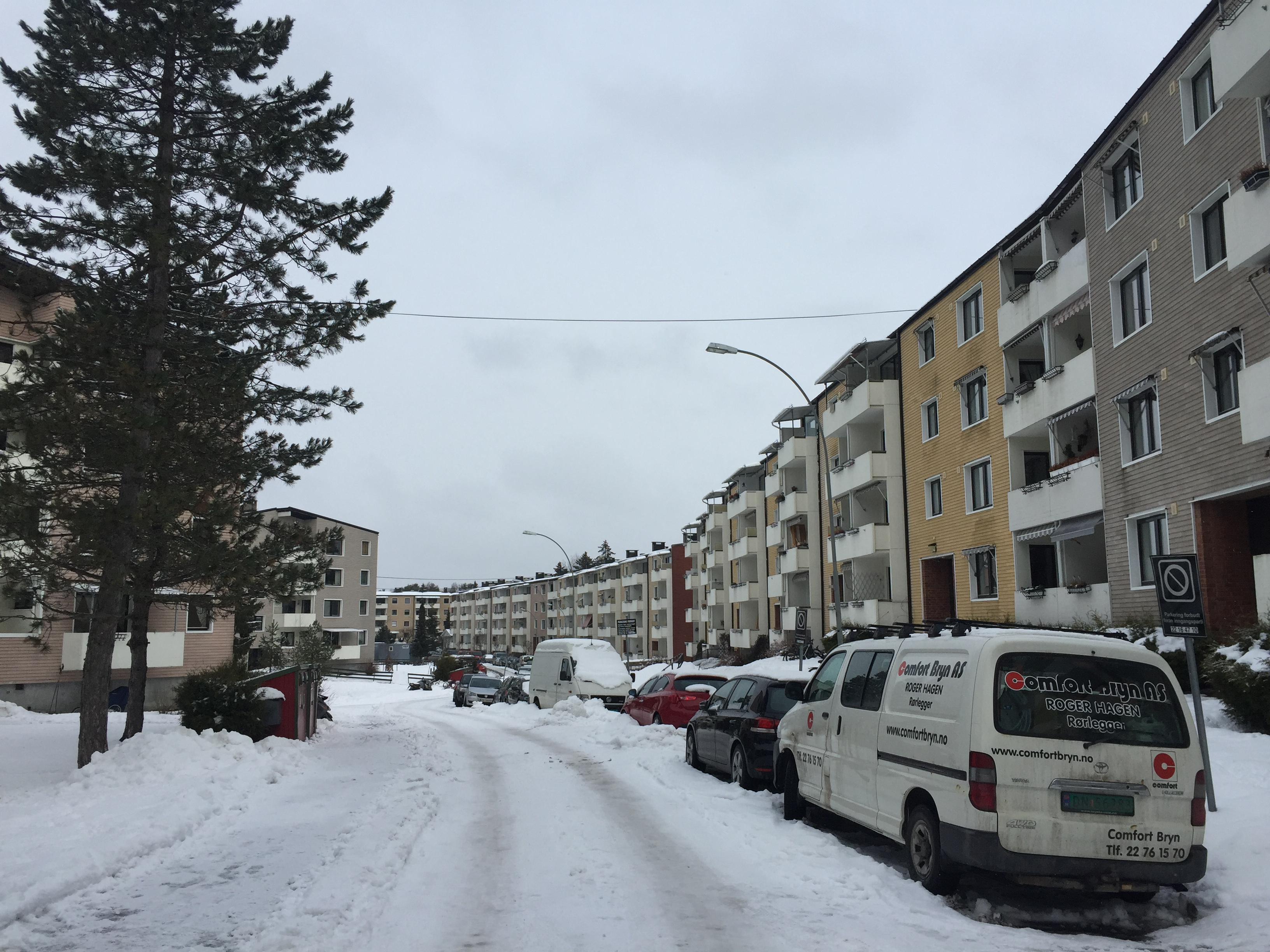 Template:Grusveien på Lambertseter i Oslo.